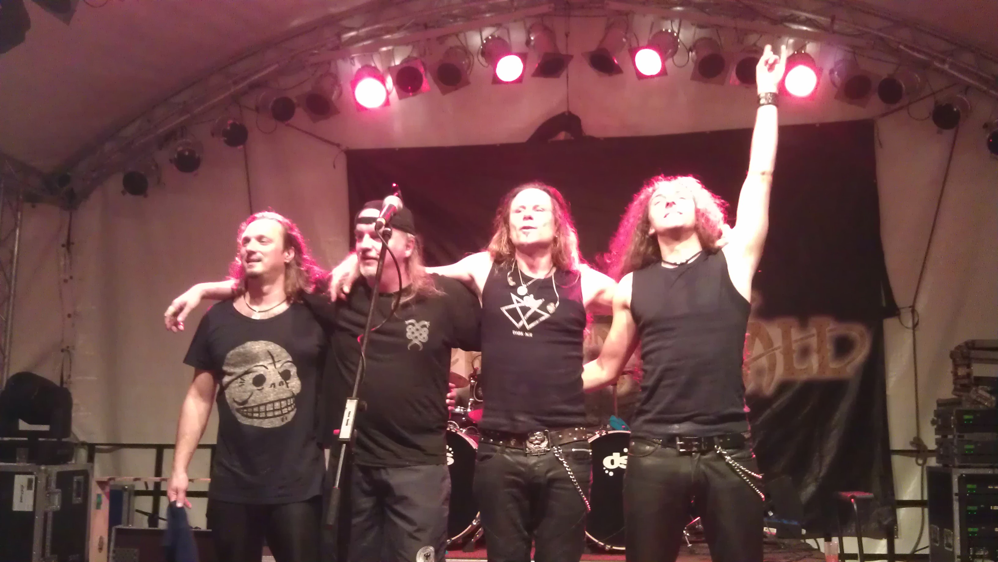 Bandphoto of the german Powermetal Band Freedom Call at a small Festival in Germany